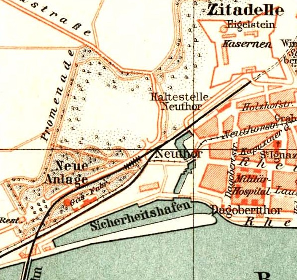 Stadtplan (Umgebung) von Mainz, hier Ludwigsstraße (Mainz)